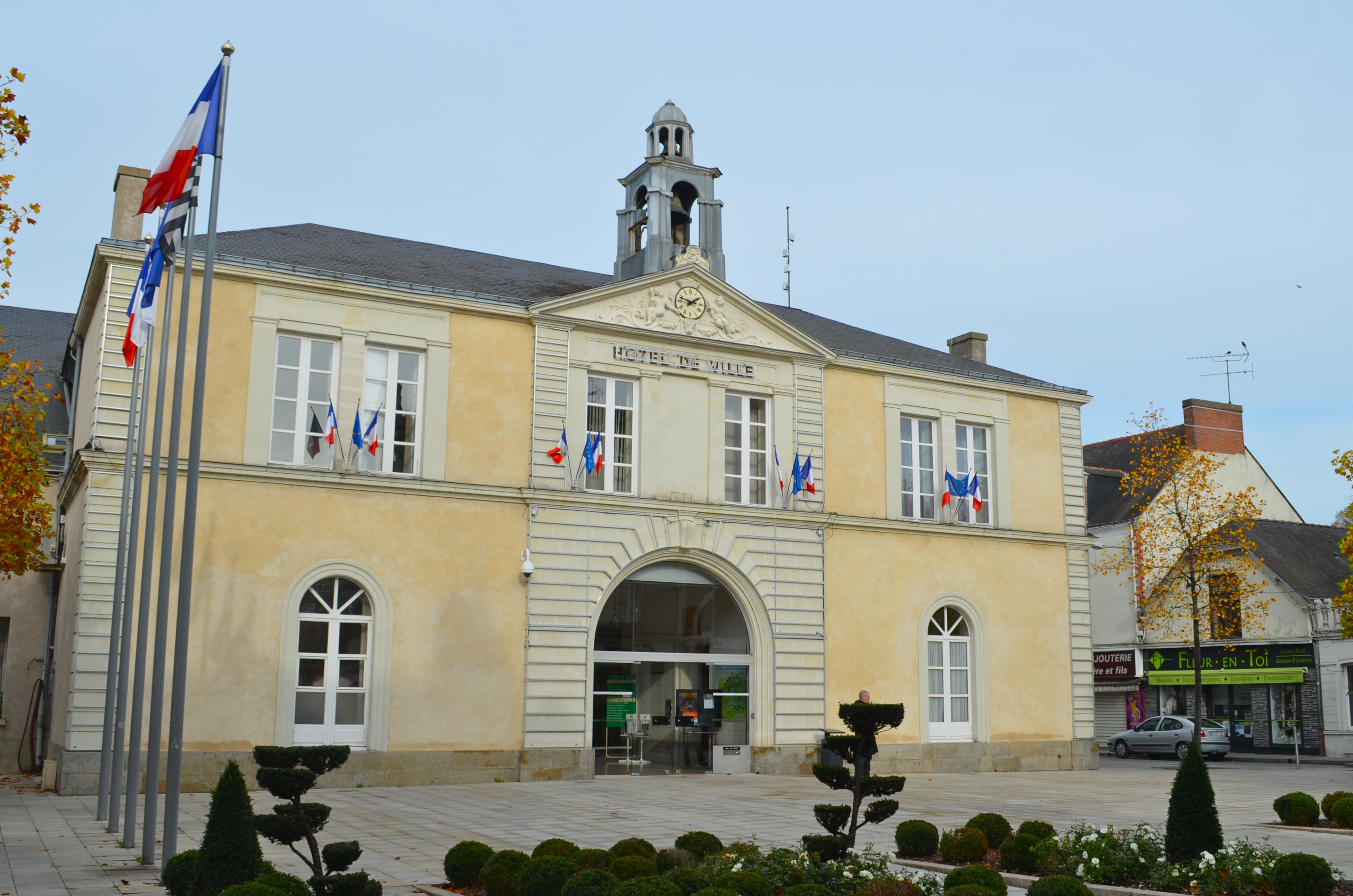 Hôtel de Ville - Châteaubriant (Loire-Atlantique)